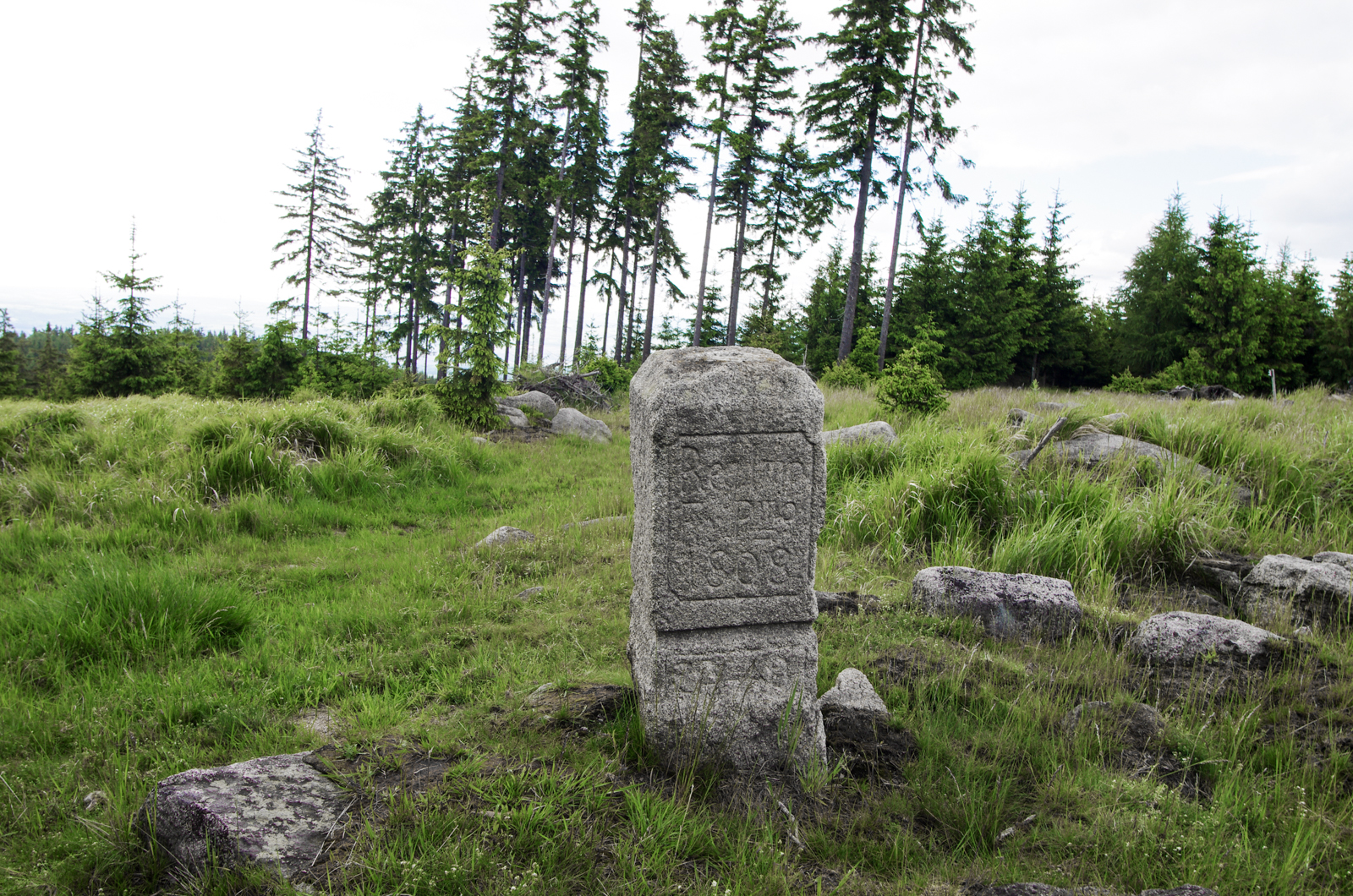 Hora Krudum ve Slavkovském lese, tzv. Francouzský kámen na hlavním vrcholu 838 m.n.m, okres Sokolov; více